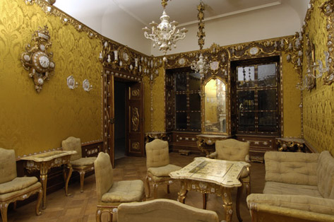 Porzellanzimmer aus dem ehemaligen Palais Dubsky in Brünn, 1720 -1740